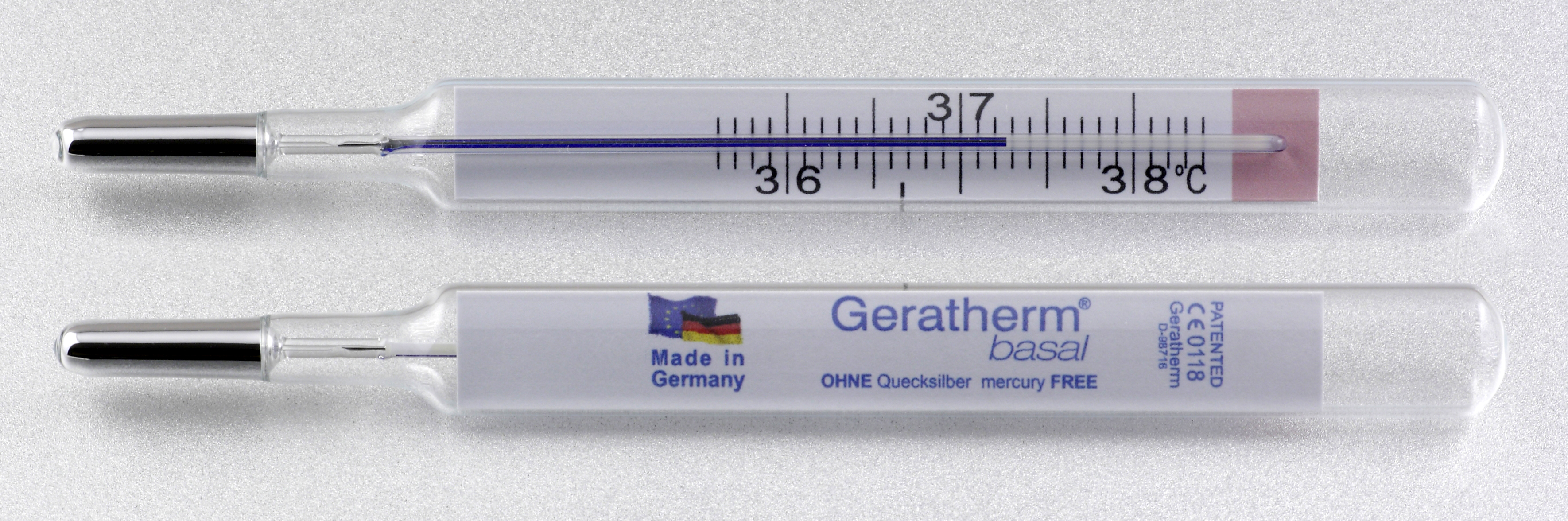 Basalthermometer mit Galinstanfüllung (Montage aus 2 Einzelbildern)